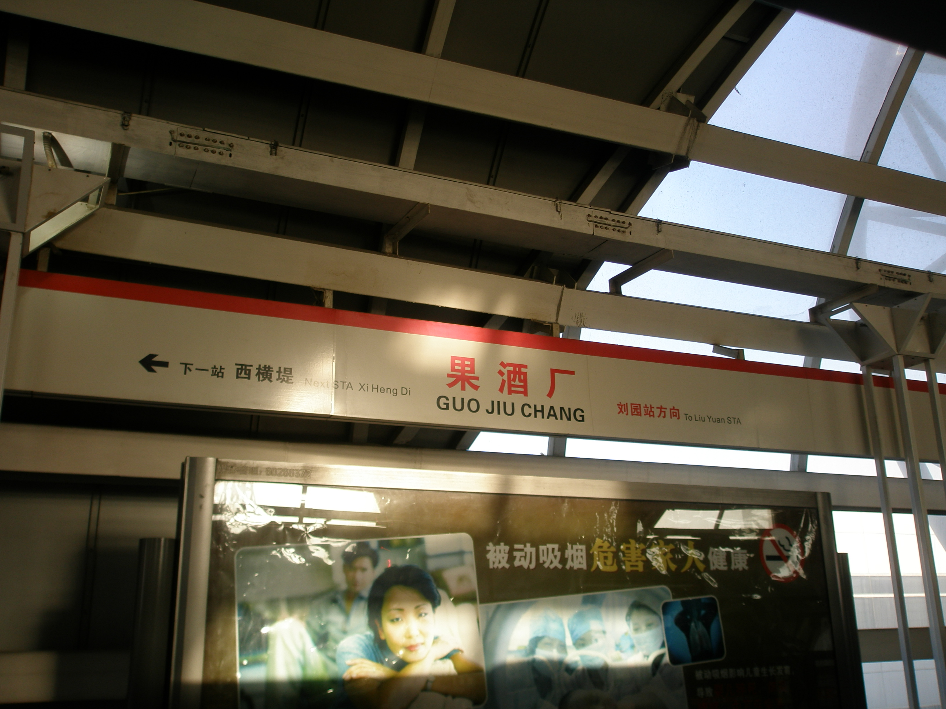 天津地铁一号线果酒厂站